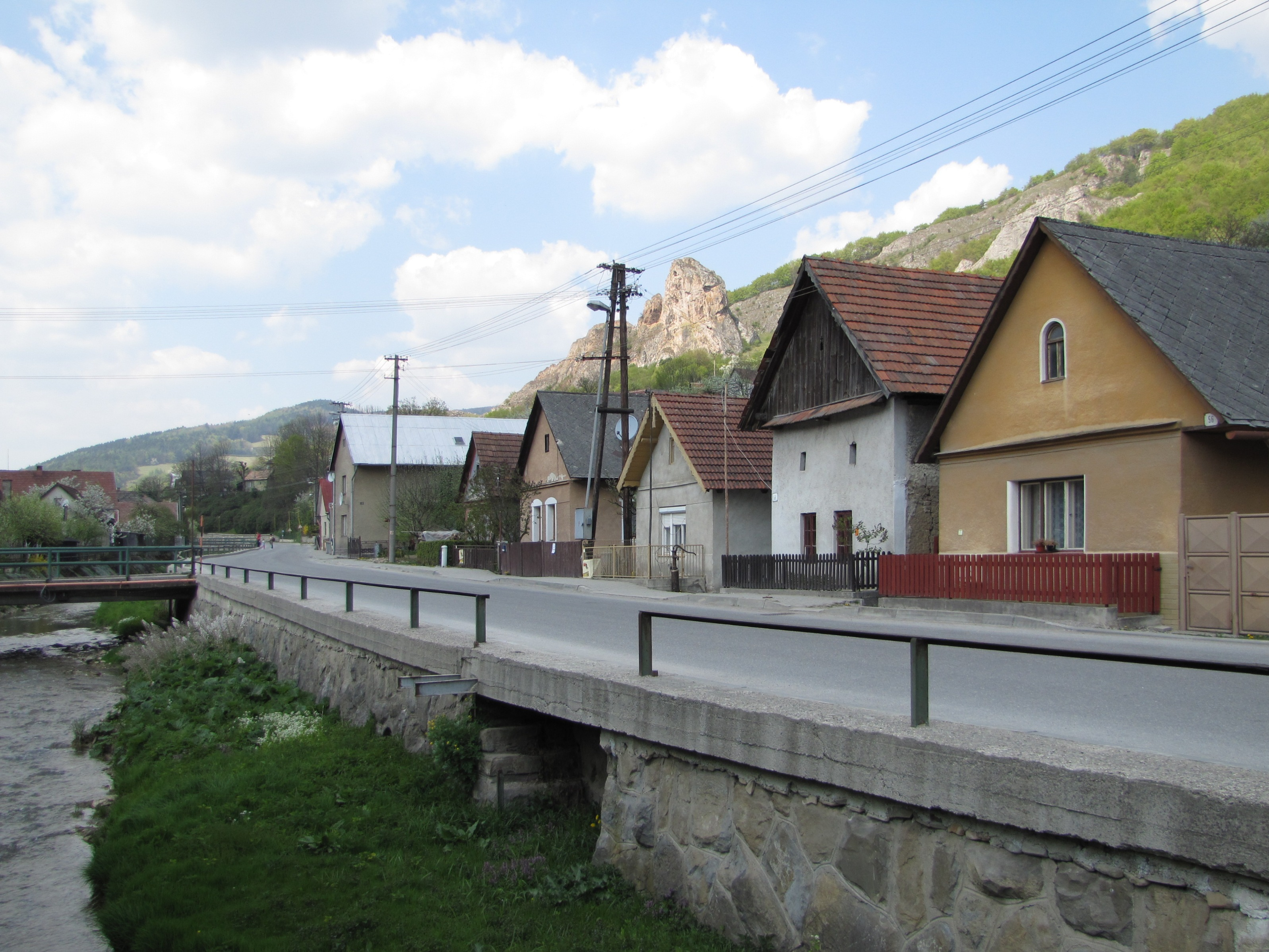 Hlavní ulice v obci Červený Kameň na Slovensku, okres Ilava, Trenčínský kraj